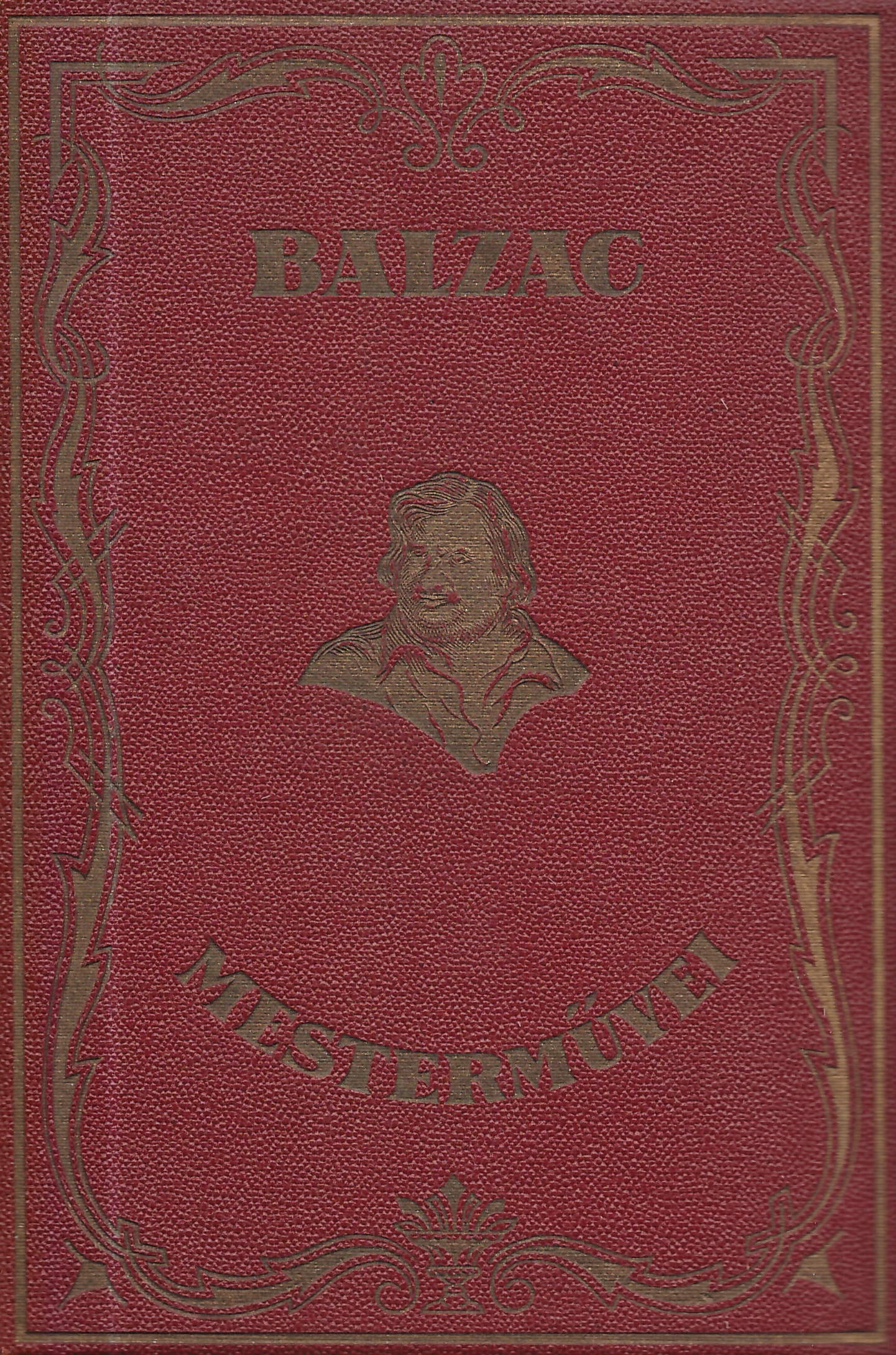 Balzac mesterművei (1920-as évek, a borító készítője nem ismert)